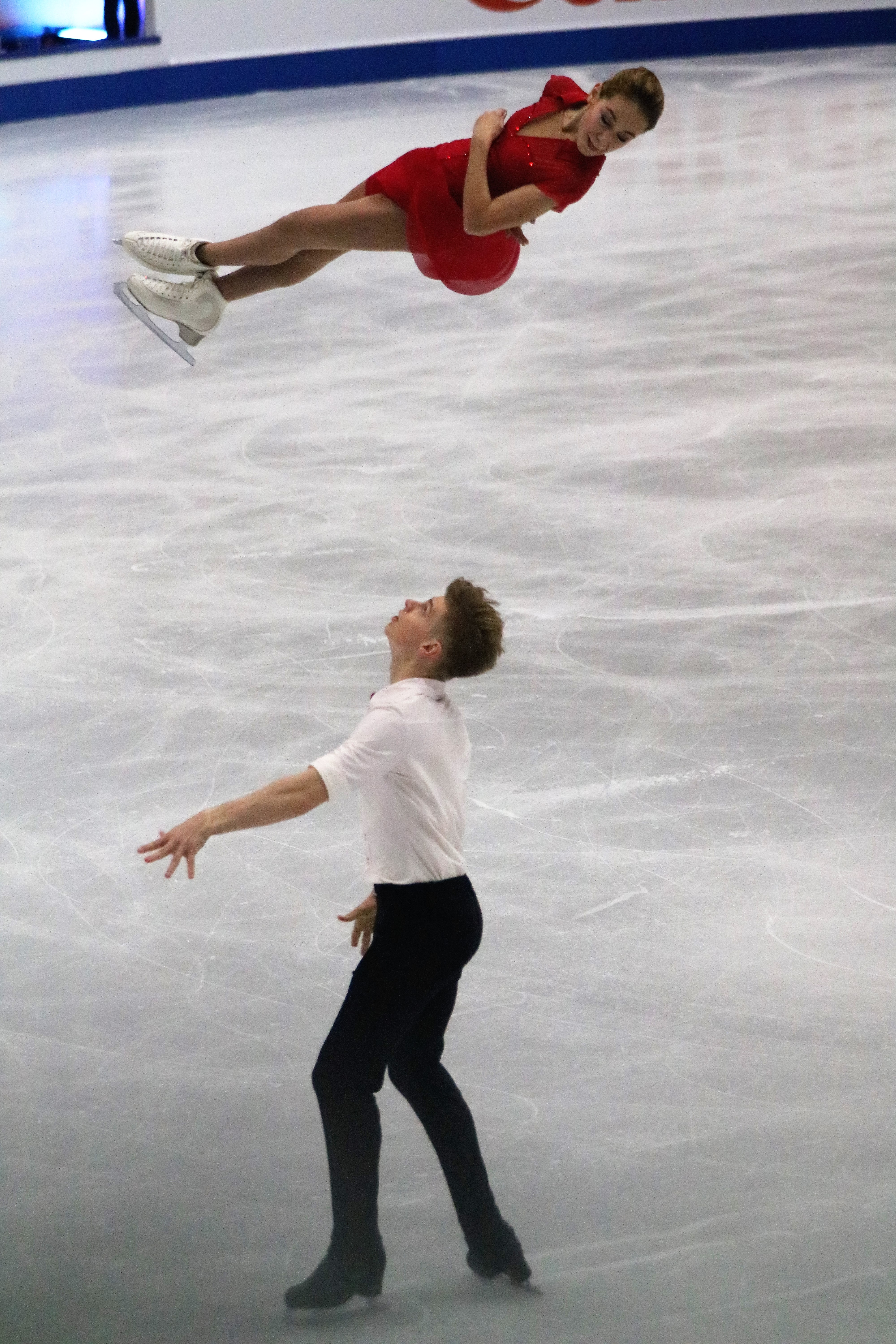 Алина Пепелева / Роман Плешков (Россия) на финале юниорского Гран-при 2019-2020